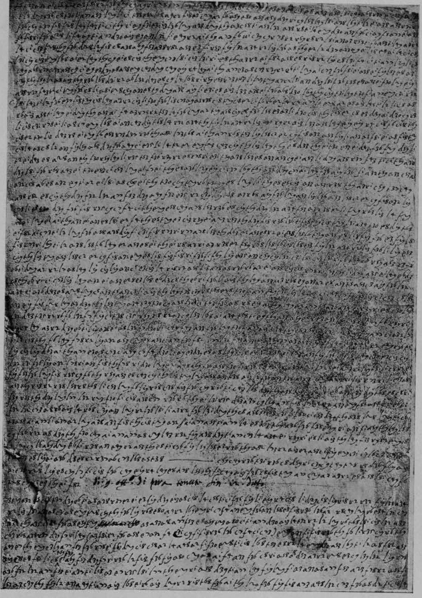 Dispacci cifratti del bailo Barbaro del ottobre 1571. L ’inferiore accenna alla vittoria di Lepanto